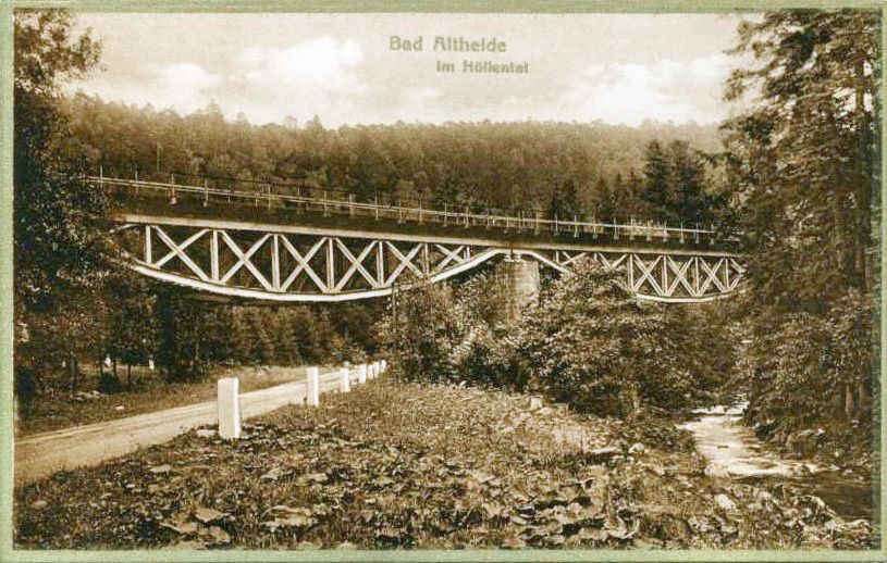 Viadukt im Höllental in der Grafschaft Glatz (Historische Postkarte)